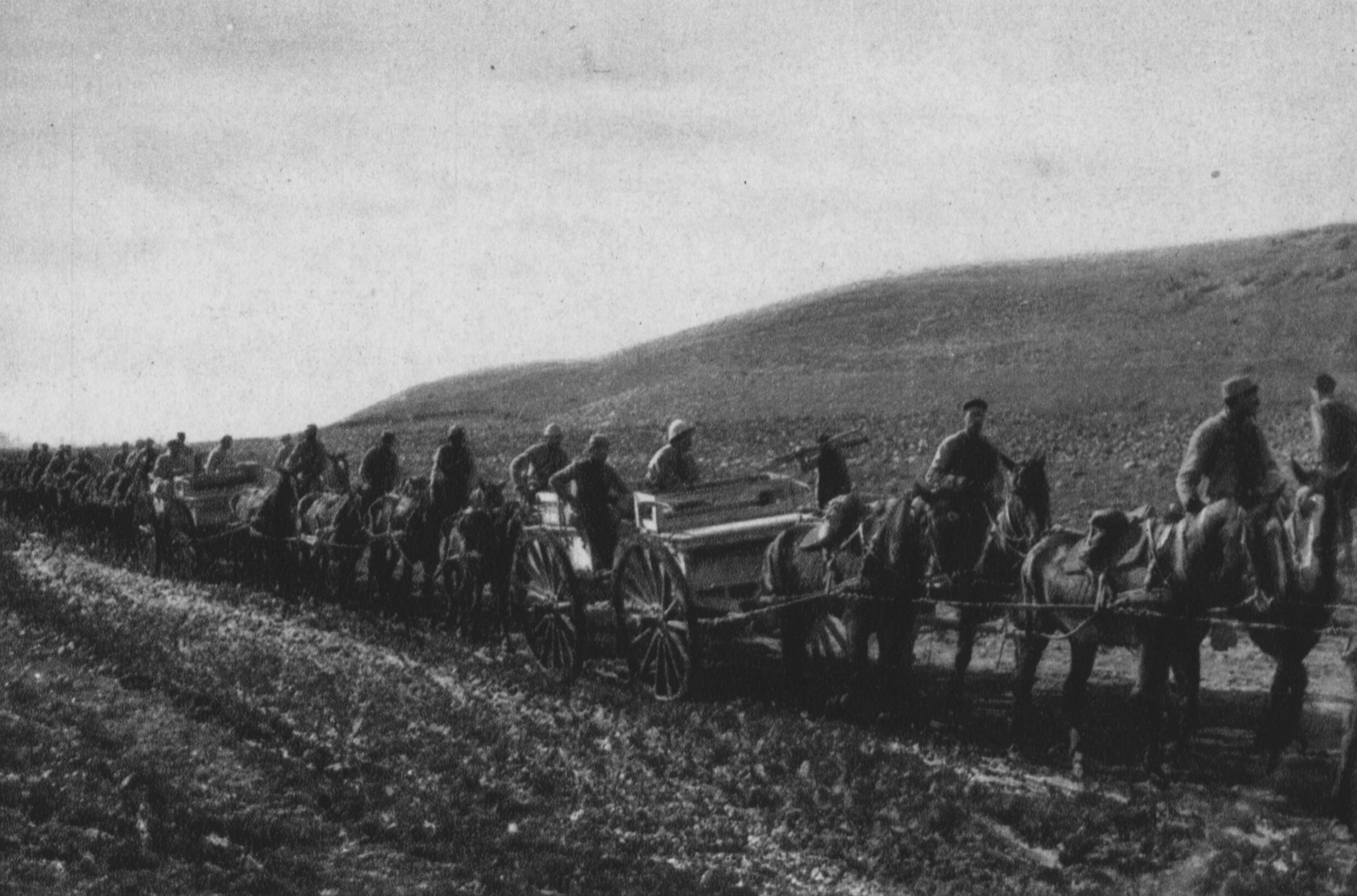 Munitionskolonne im unwegsamen Gelände bei Bostaran an der mazedonischen Front (Oktober 1916).